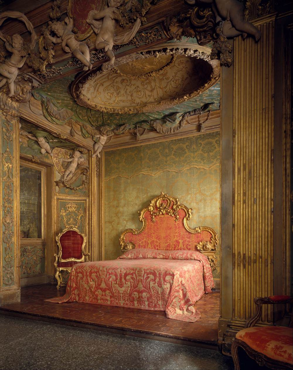 Interior decoration (detail) 1718 Stucco Palazzo Sagredo, Venice